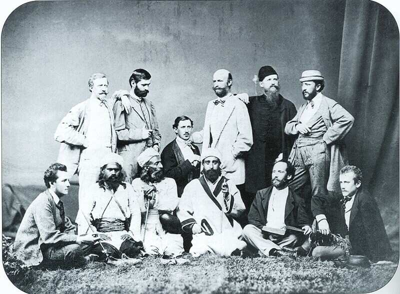 Zichy Jenő gróf és Vámbéry Ármin (ülő sorban jobbról a második) kísérőikkel, 1864